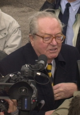 Protection d’un Homme politique Français (Jean Marie Lepen Député Européen) en interview et ses officiers de sécurité.